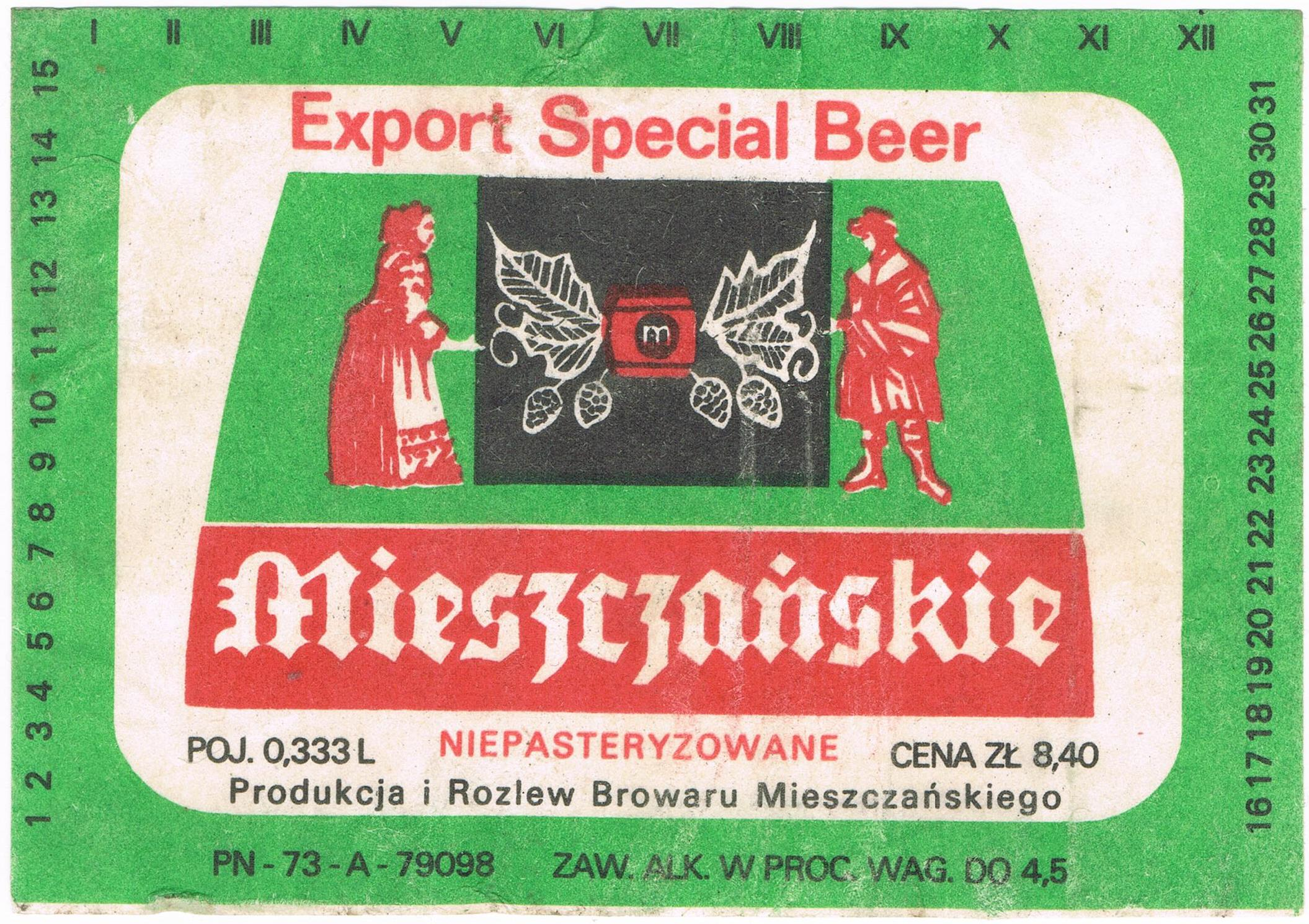 Piwo Mieszczańskie - etykieta